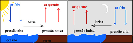 Diagrama com brisas marítmas